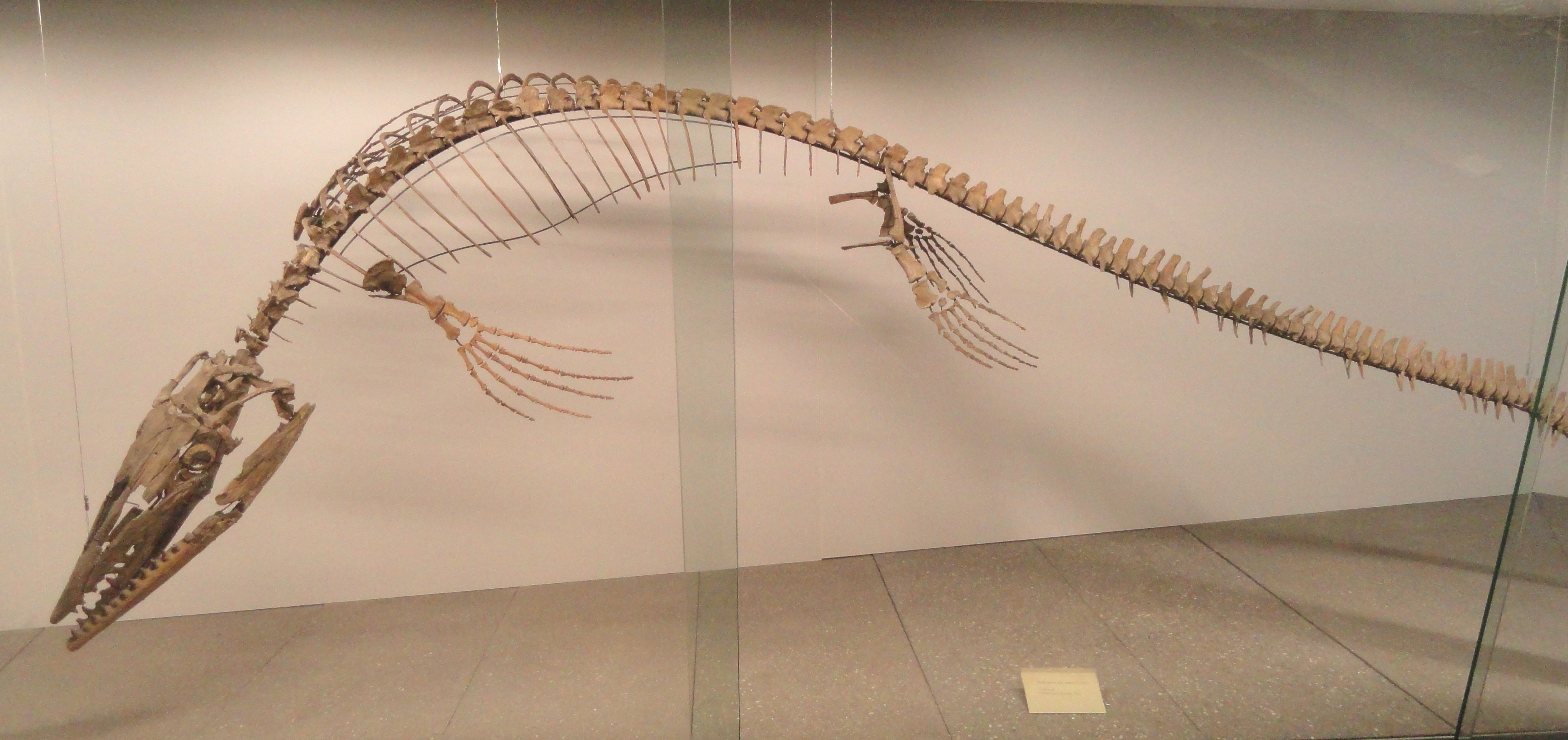 Exhibit in Naturmuseum Senckenberg, Frankfurt am Main, Germany.